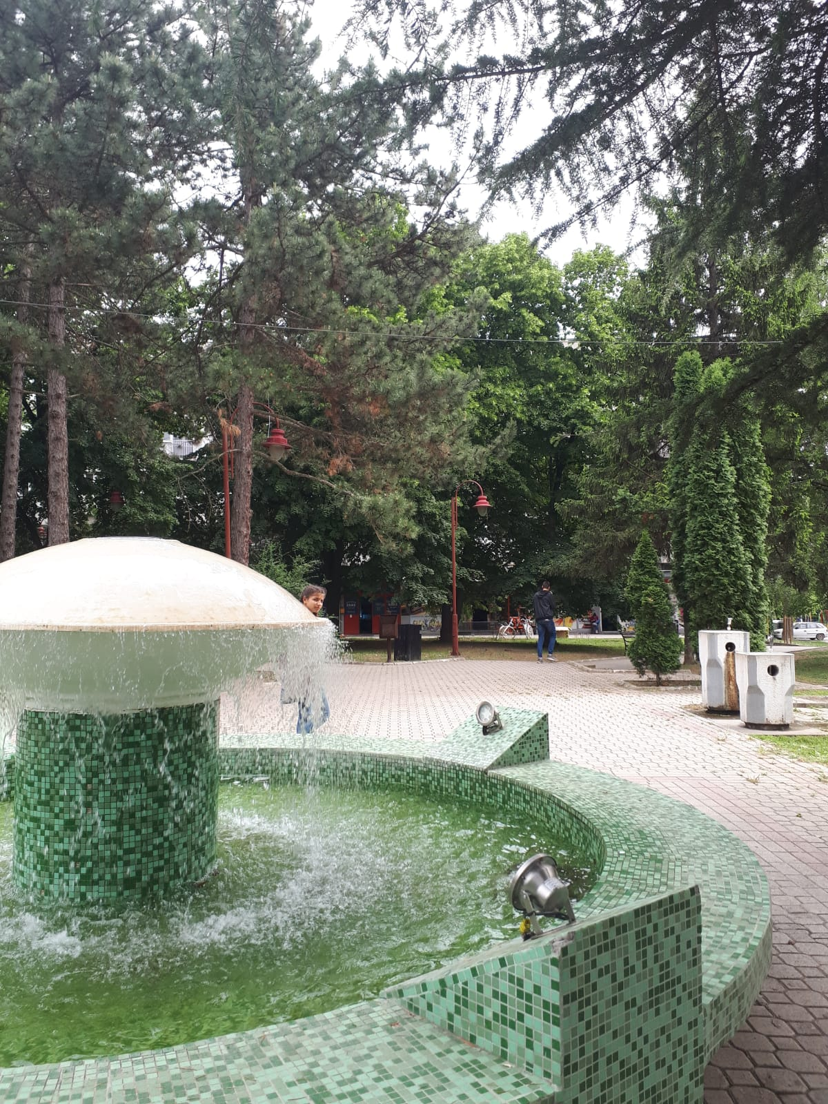 Градски парк у Костолцу.